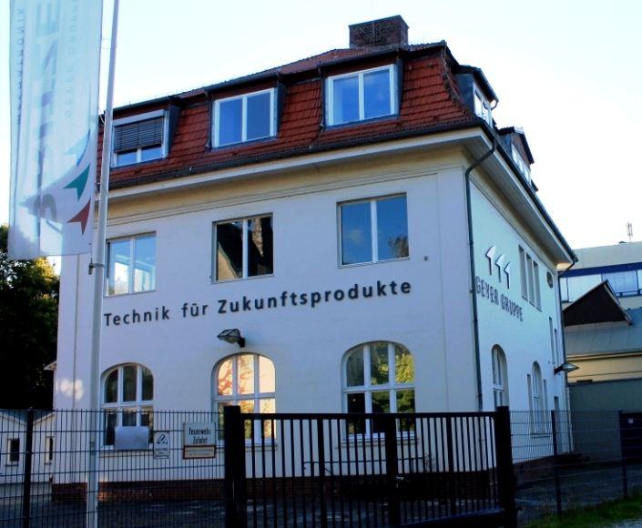 Ehemalige Marineversuchsanstalt Berlin-Lichtenrade